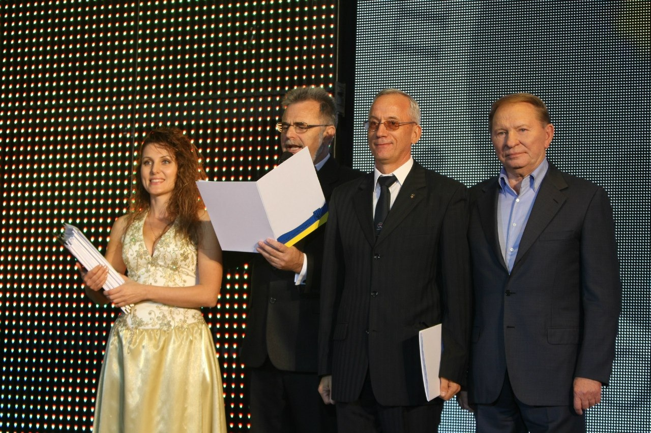 Копія фрагменту фото Володимира Мельникова з ведучою Іриною Макеєвою, головою журі народним артисом України Мар'яном Гаденком та співзасновником фестивалю "Доля! Президентом України в 1994-2004 роках Леонідом Кучмою. Сцена актової зали Київського національного університету технологій та дизайну, 06.10.2014 року.